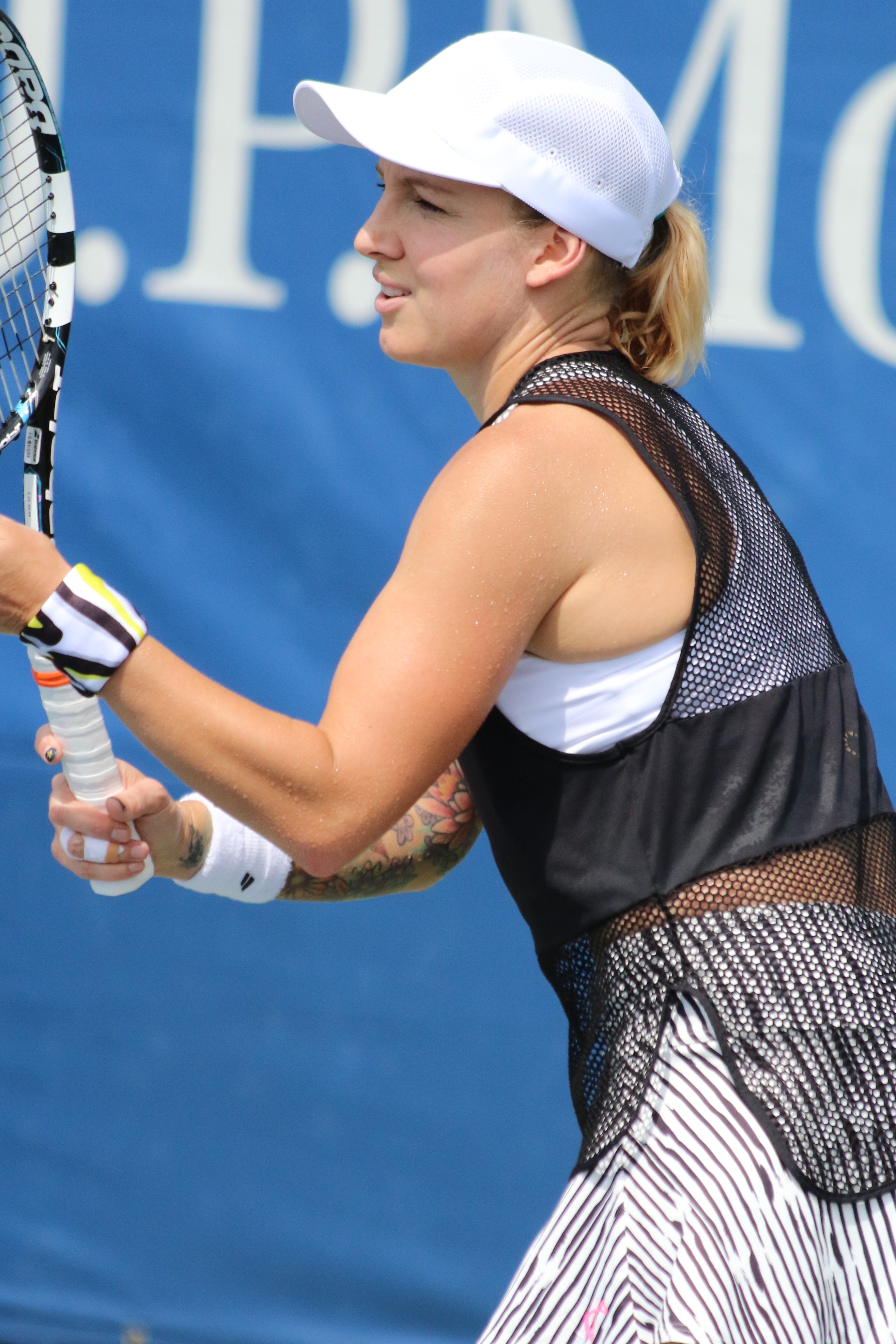 Mattek Sands US16 (7)